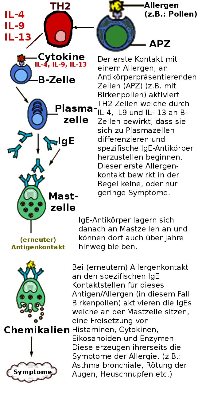 Eine kurze Symbolische Erläuterung der Rolle von IgE in Allergien des Typ 1